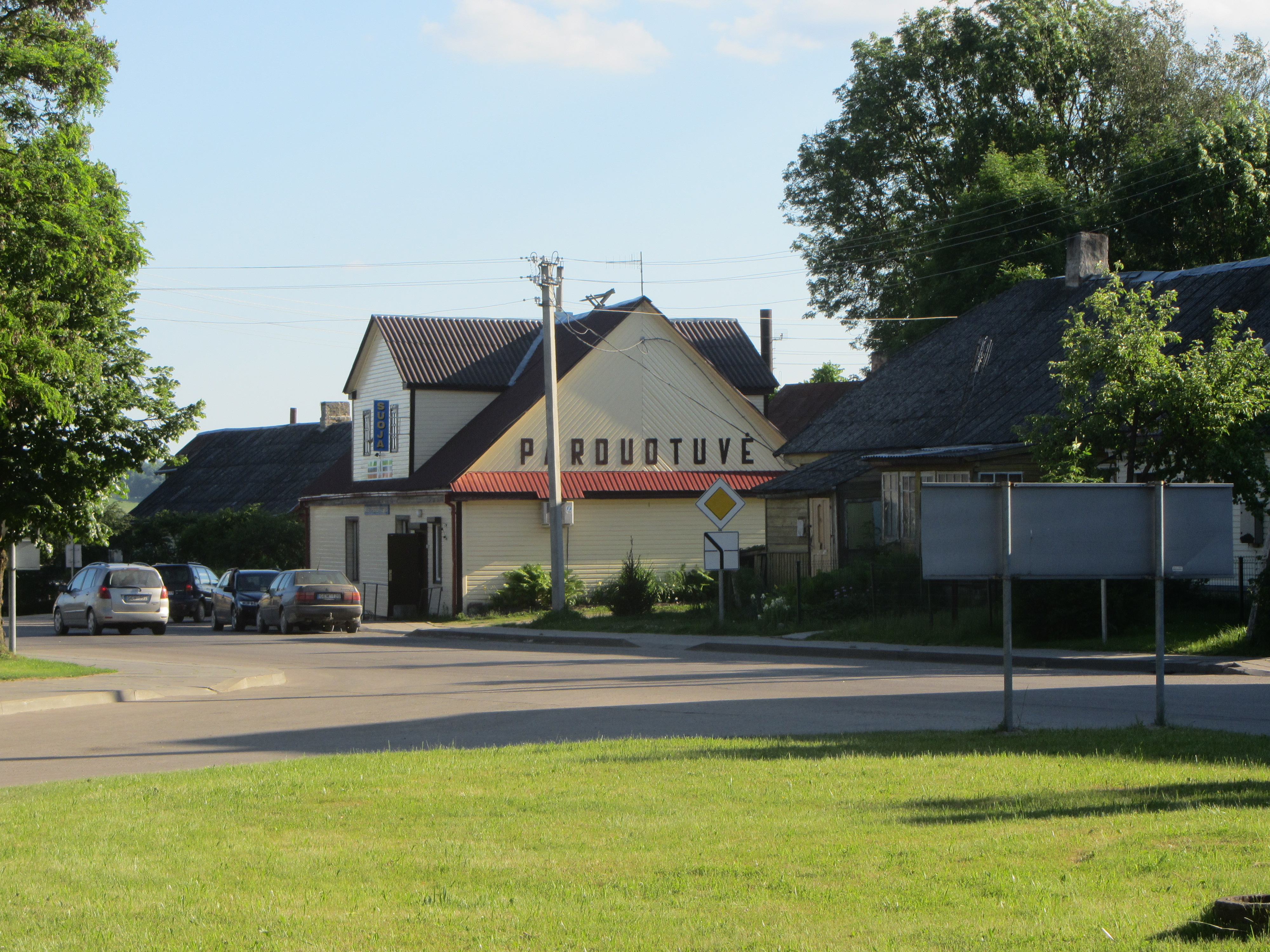 Alanta, Lithuania